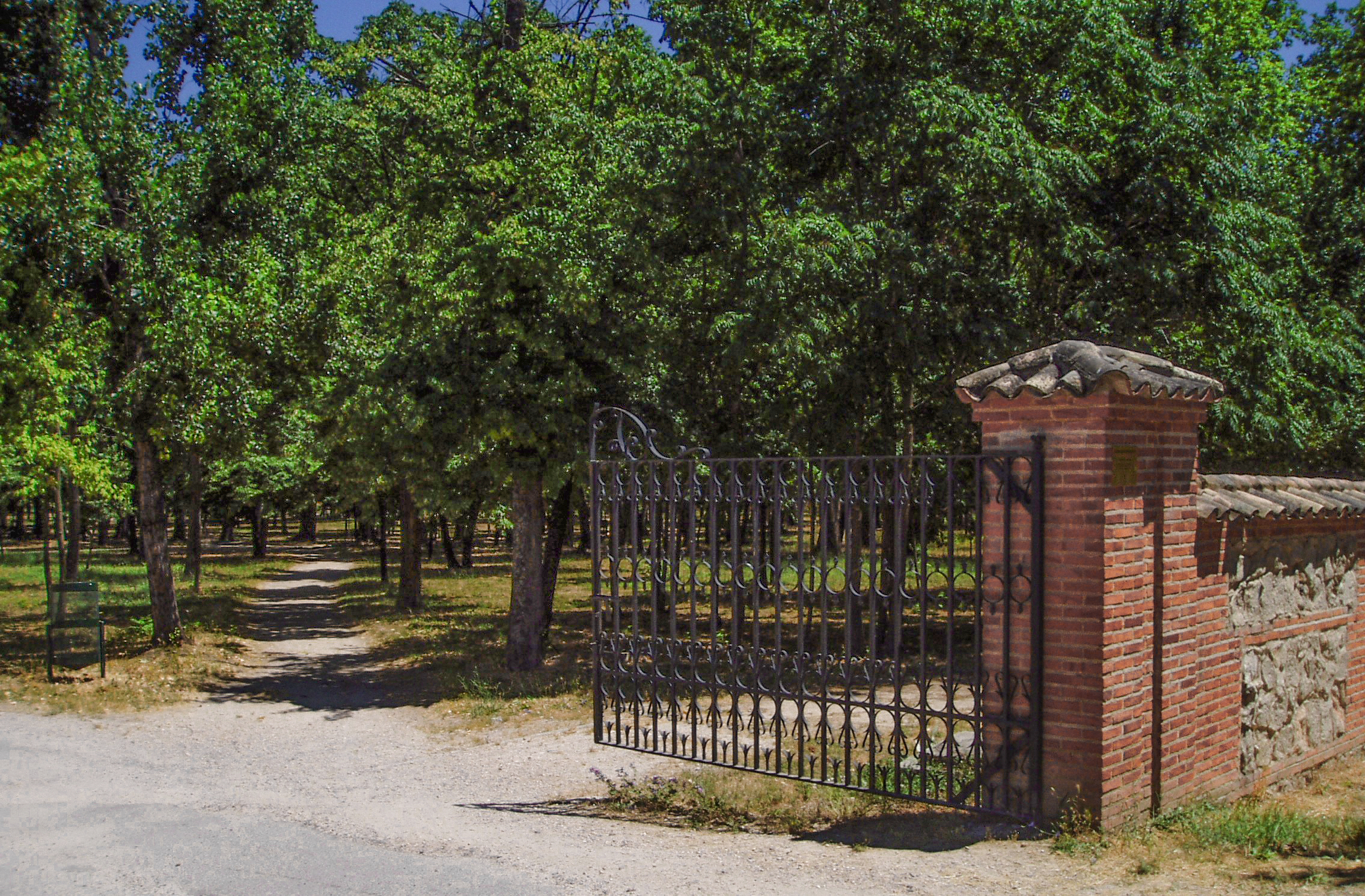 Reservado Grande. Casa de Campo. Madrid. España